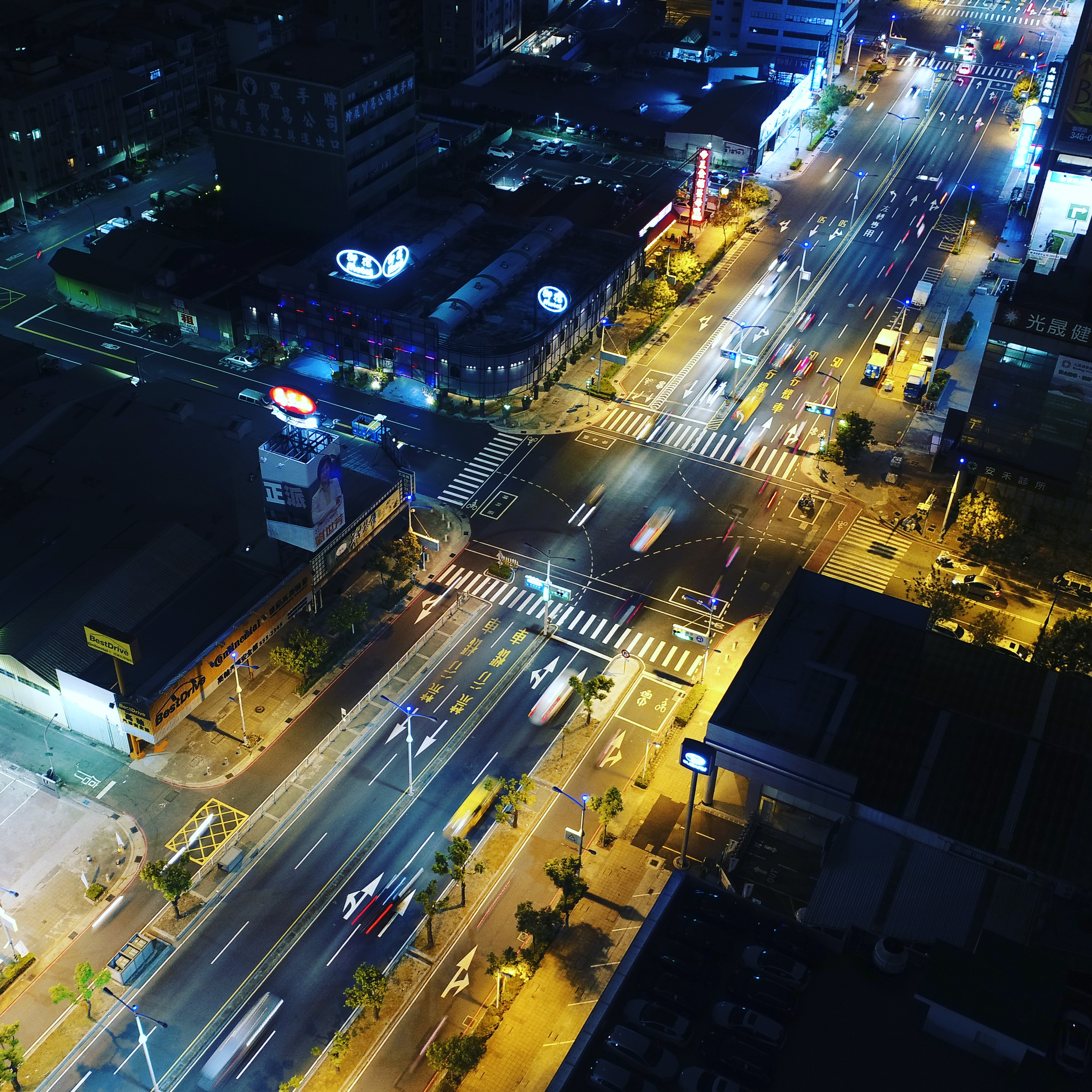 近愛河之星的博愛一路